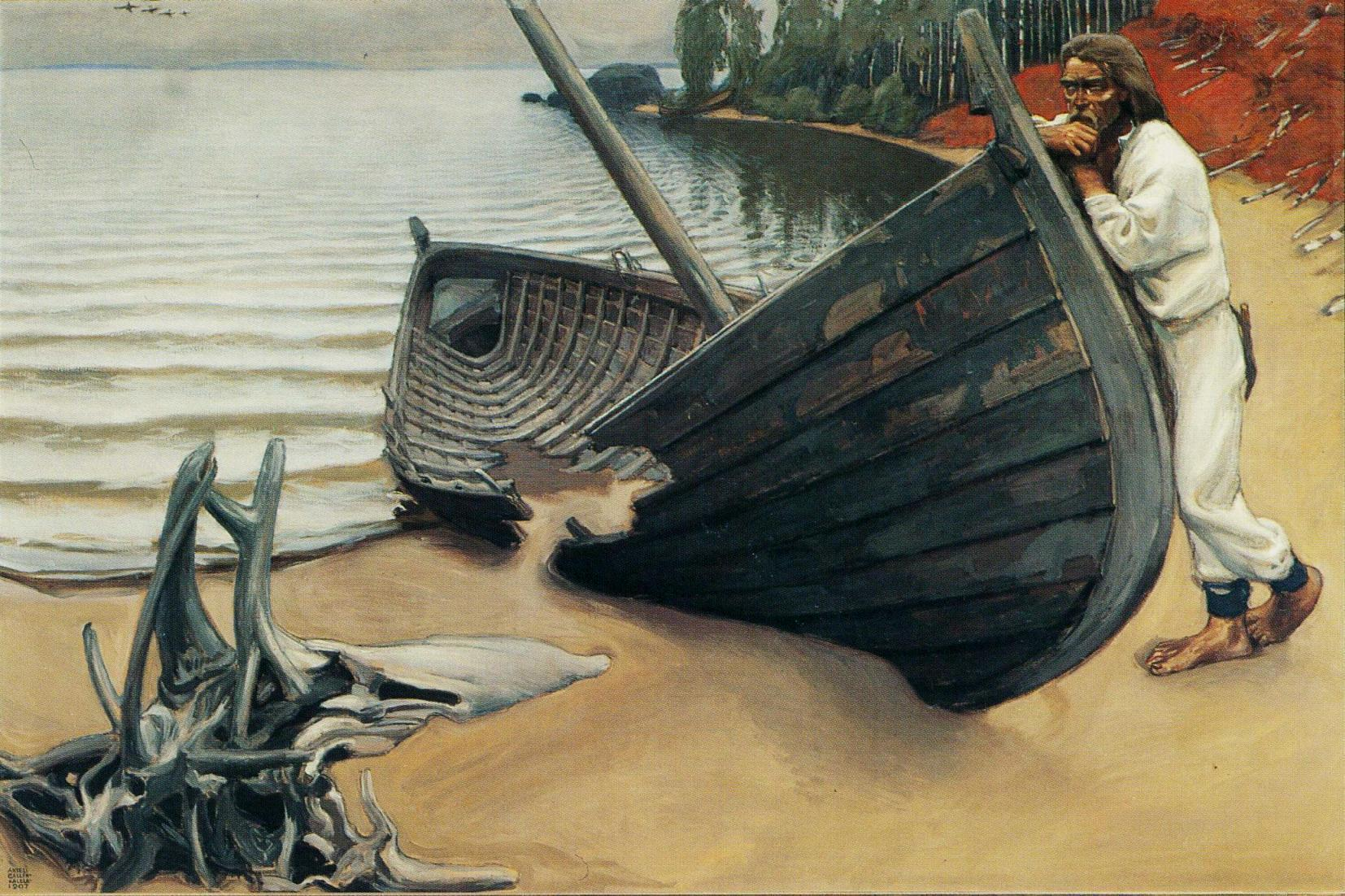 Akseli Gallen-Kallelan Kalevala-aihepiiriin liittyvä maalaus. Teoksen omisti aikanaan muun muassa ministeri Onni Talas, jonka perikunta myi sen vuonna 1961 Kansallis-Osake-Pankille. Se kuuluu nykyään Taidesäätiö Meritan kokoelmiin.